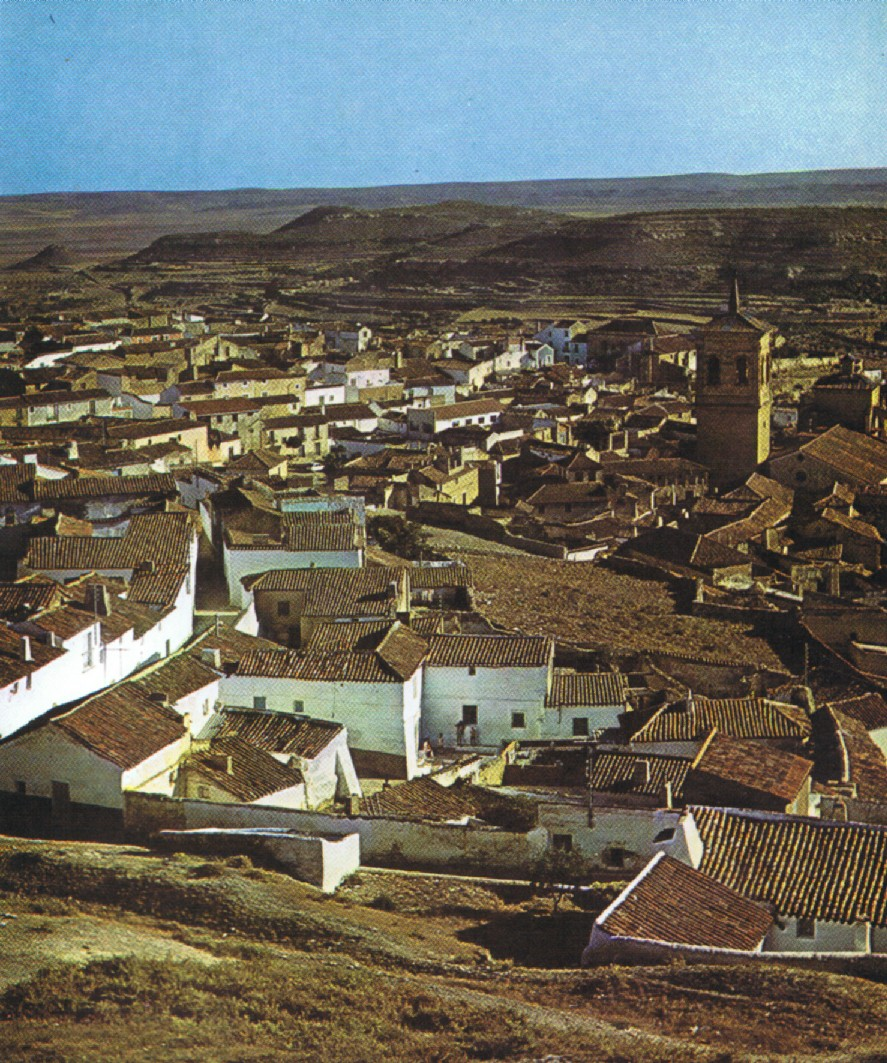 Paisaje de la Mancha de Montearagón (ciudad de CHinchilla-Albacete-España)